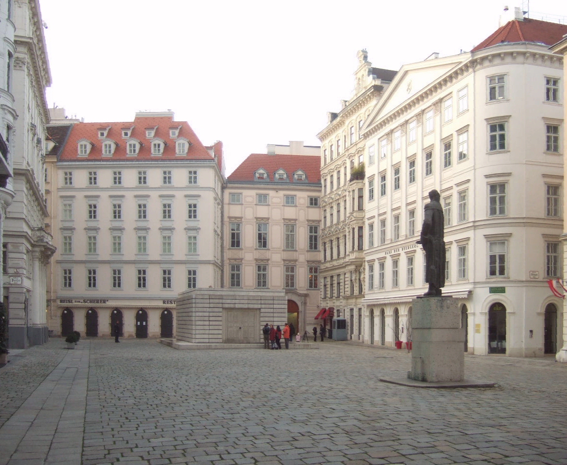 Wien - Judenplatz mit Lessing-Denkmal und dem Mahnmal für die österreichischen jüdischen Opfer der Shoa